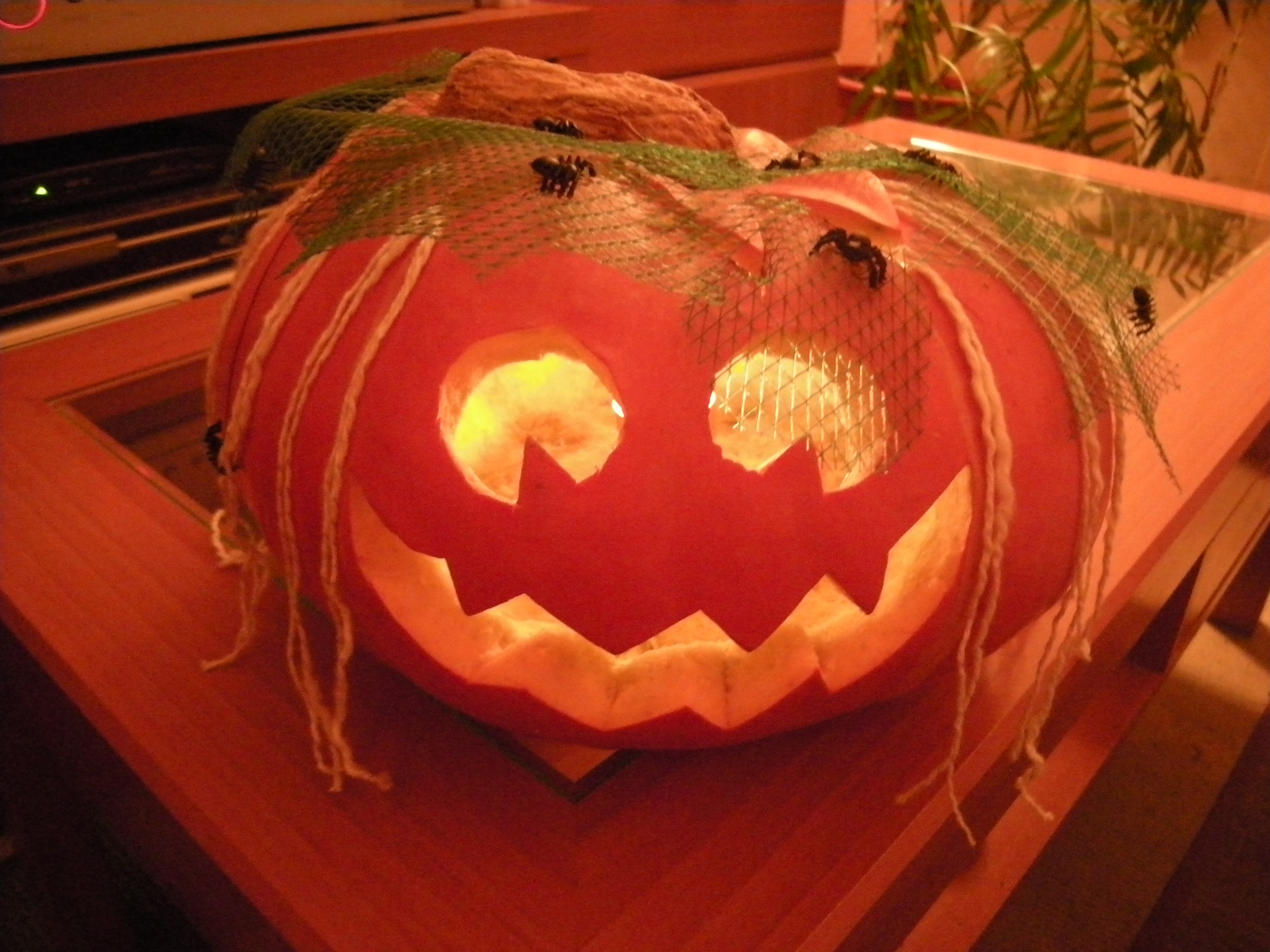 Feliz noche de Samhain a todos.